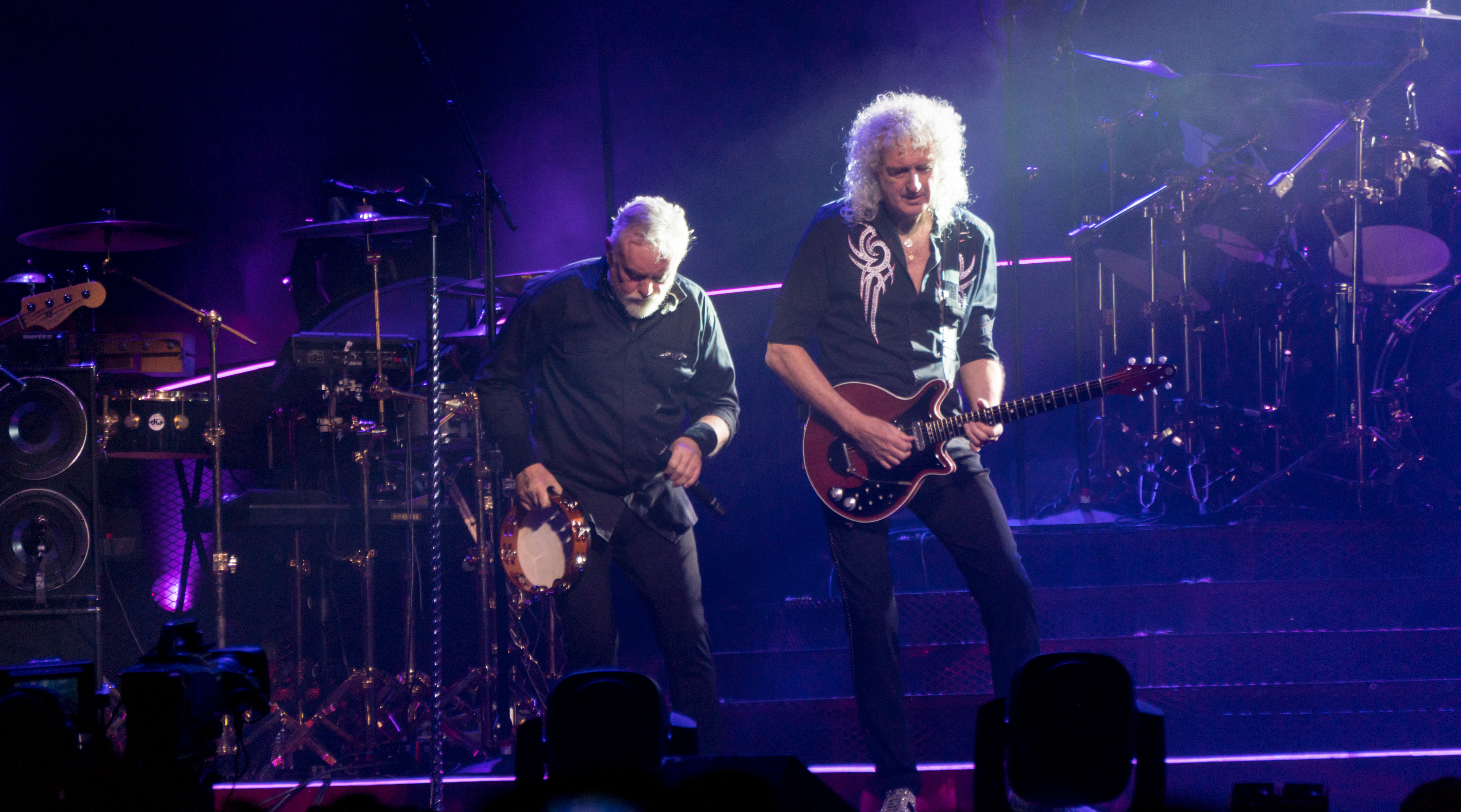 QueenO2121217-56